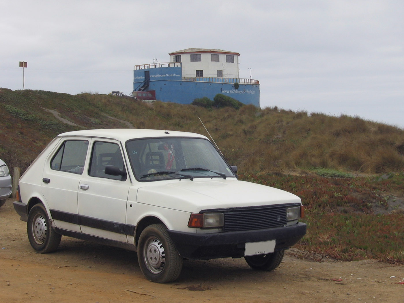 Seat Fura 1100 GL 1985